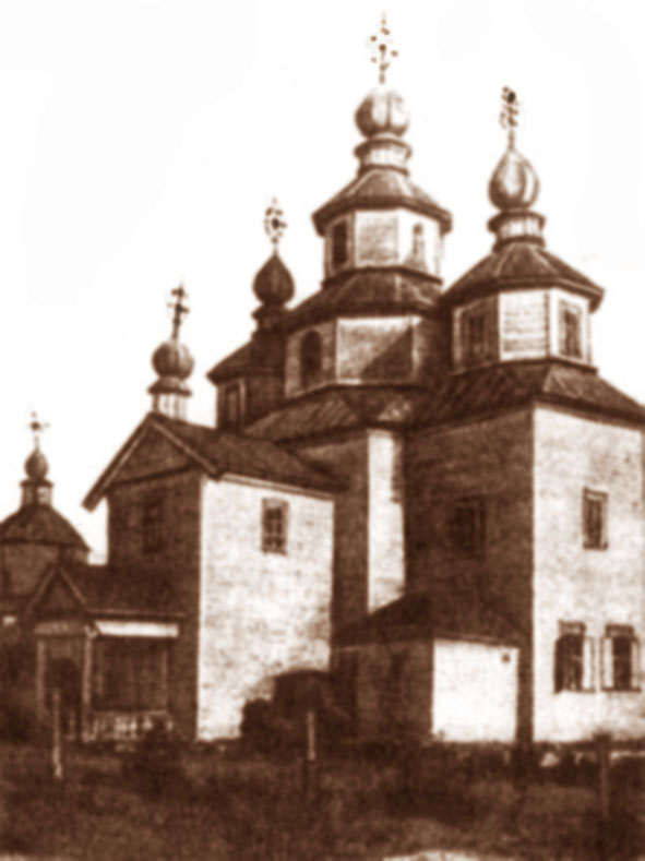 Храм у селі Старі Кодаки